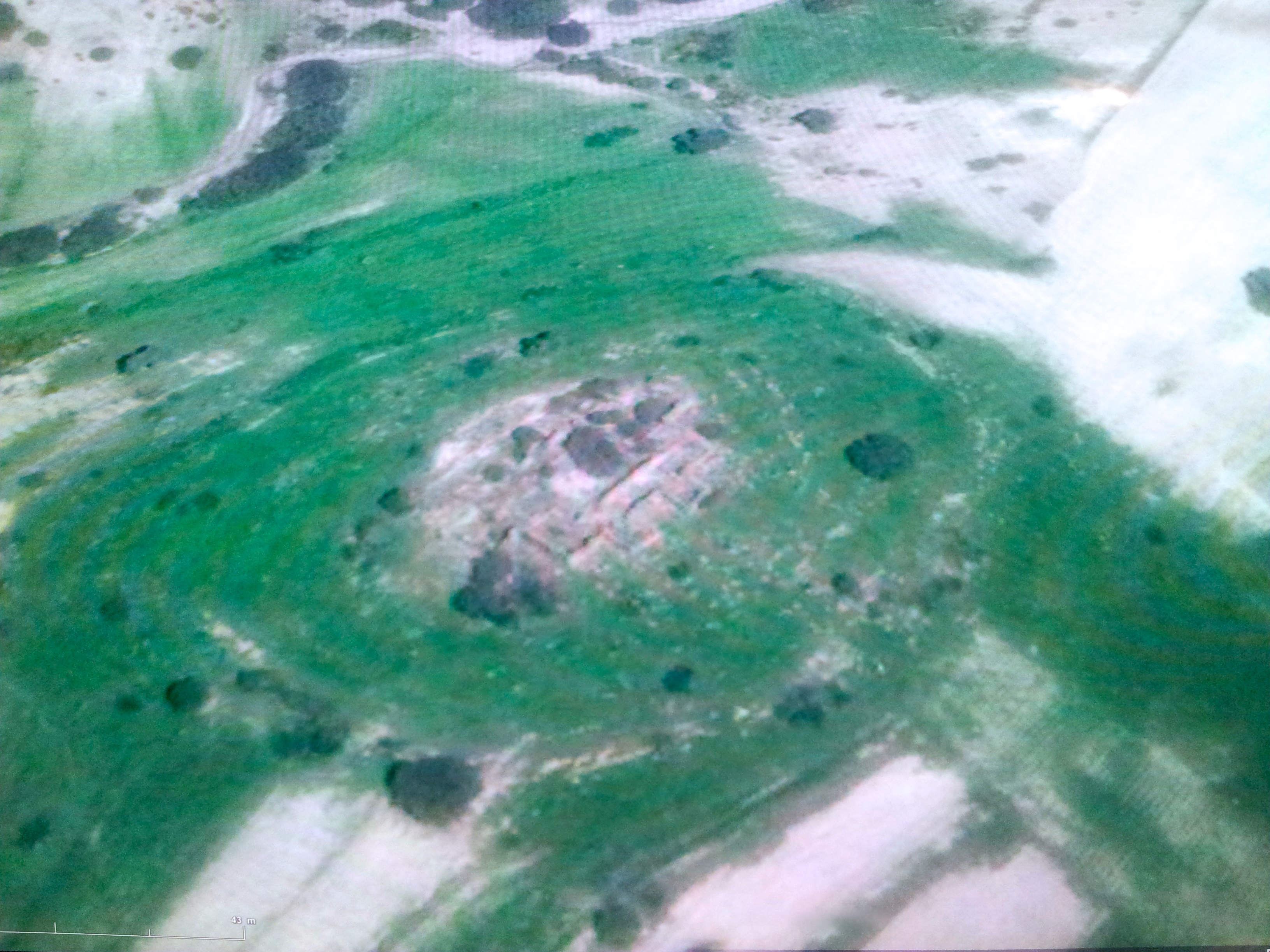 Vue aérienne des ruines du château romain Ksar el Koua à Ammi Moussa (Algérie)